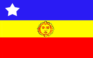 Bandera del municipio Sucre. Estado Trujillo. Venezuela